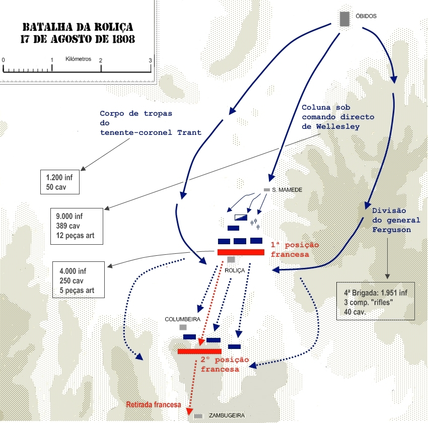 Mapa com esquema da batalha da Roliça (17Ago1808)